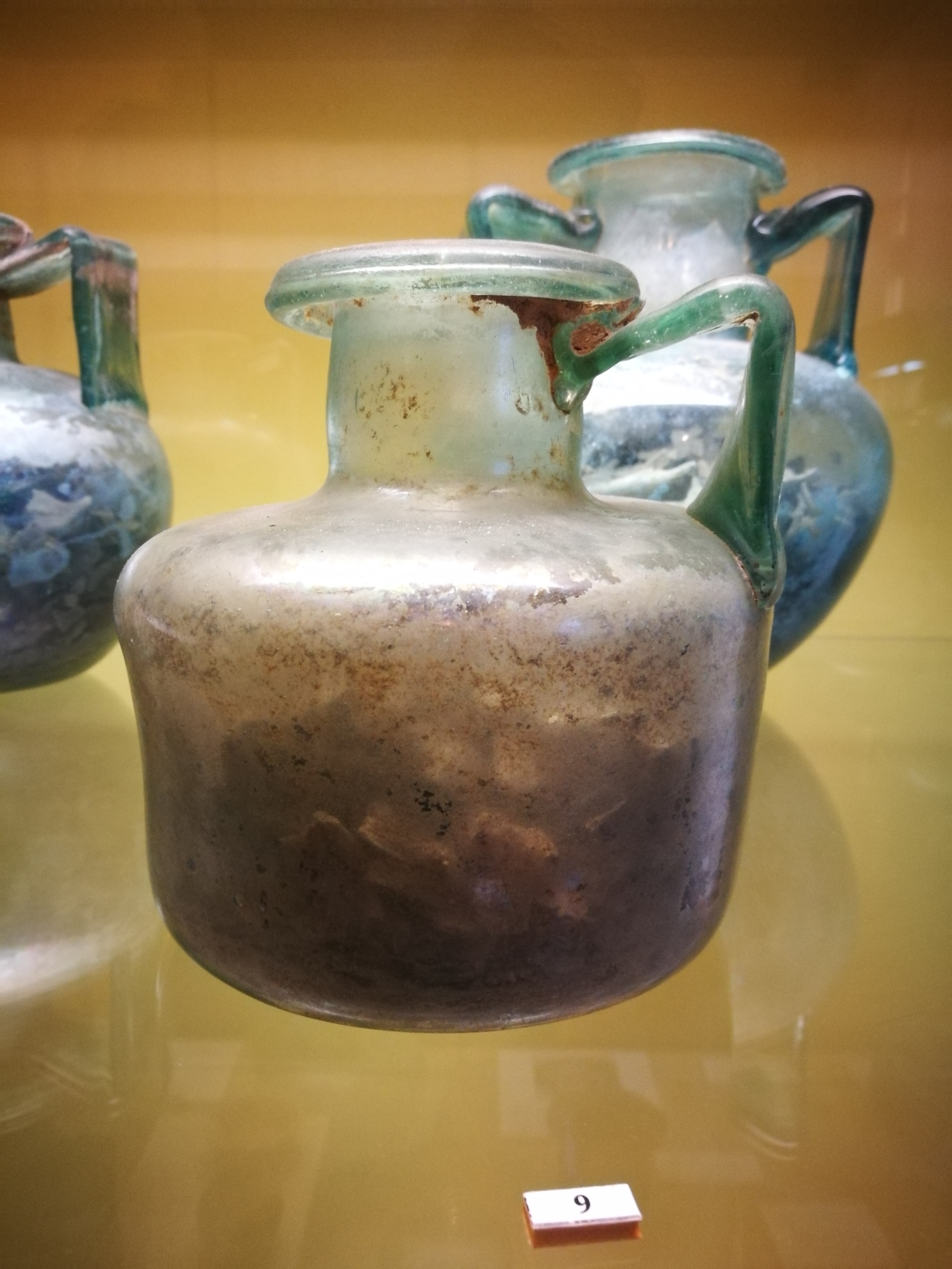 Urne funéraire en verre découverte à La Forêt-du-Temple, France. Exposée au Musée de la Sénatorerie à Guéret, en 2018. Notice du musée : « Bouteille cylindrique à une anse » Lieu : La Forêt-du-Temple (chef-lieu de commune) Collection : François Ravaud Numéro d'inventaire : 71